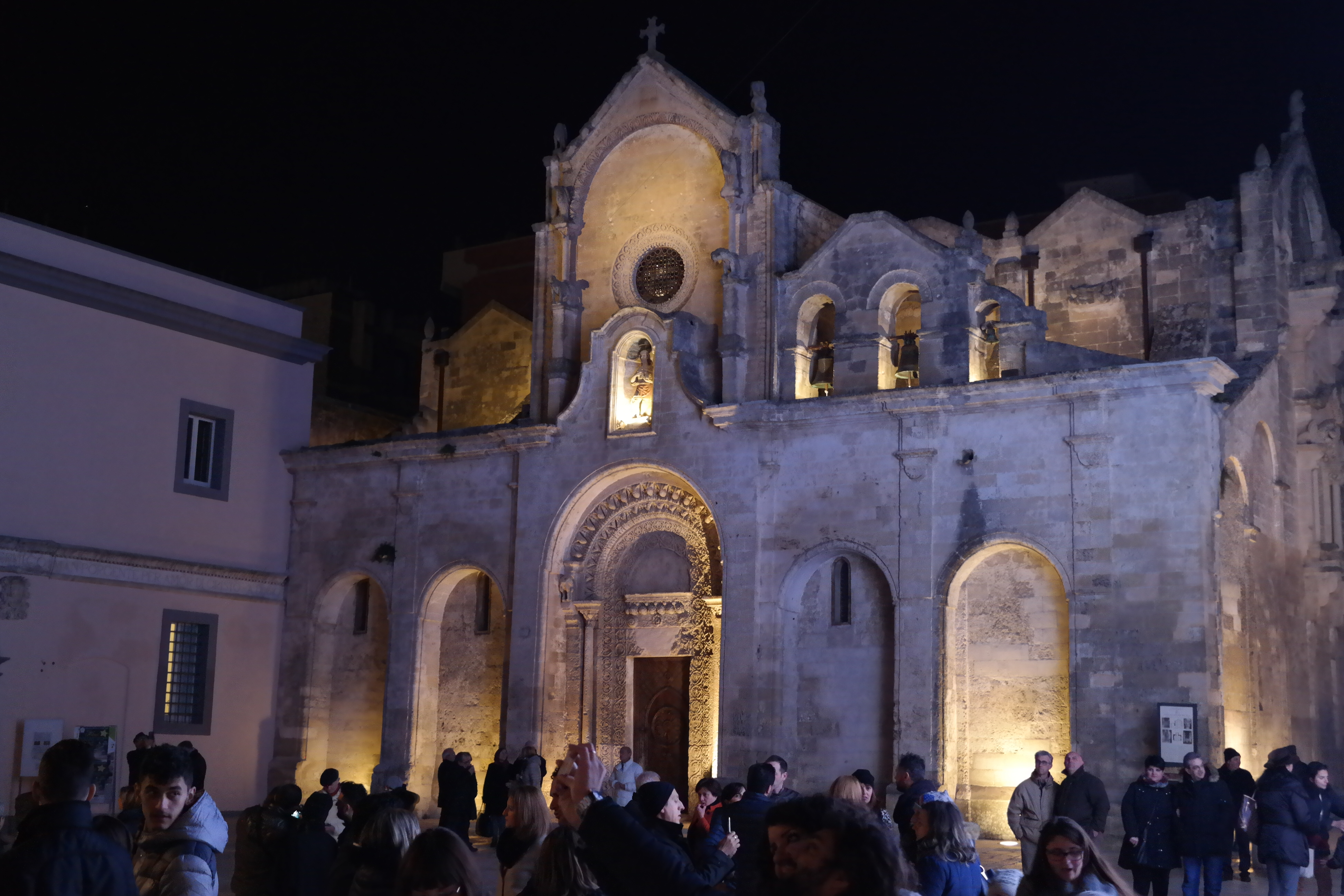 Chiesa di San Giovanni a Matera